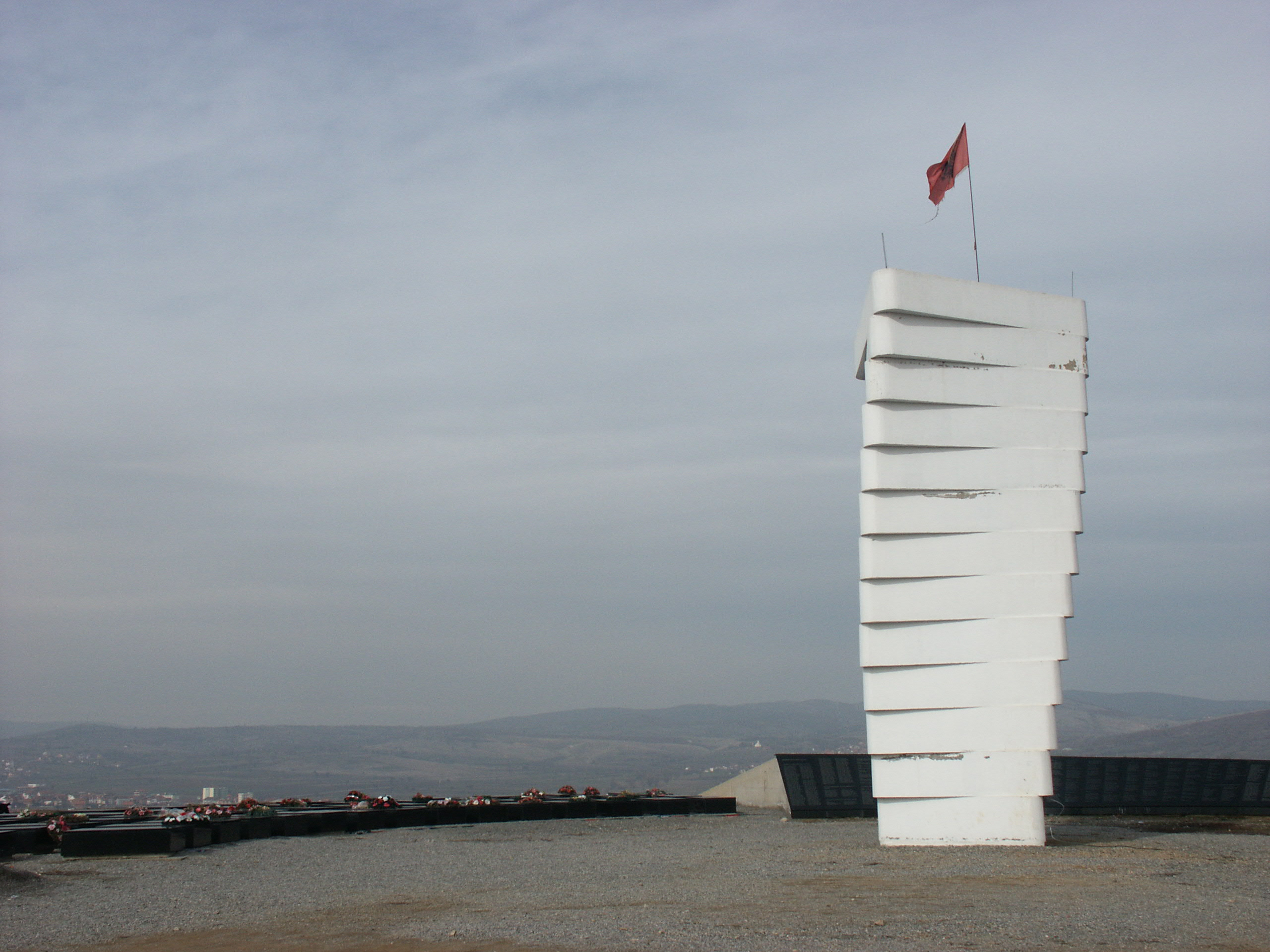 Kodra e Deshmorve